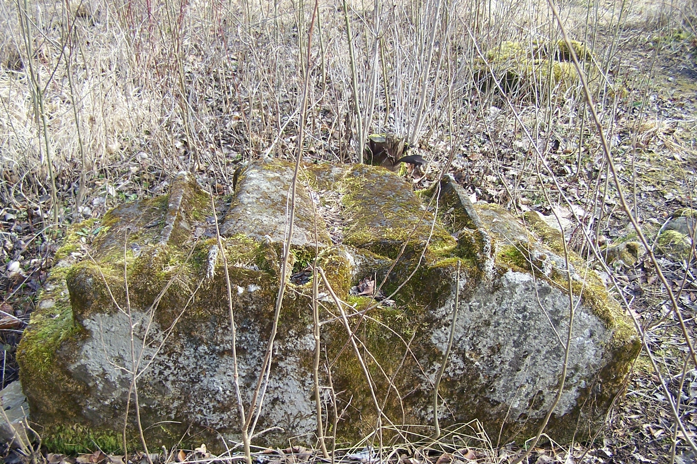 Fragment der Bismarcksäule auf dem Wartenberg bei Eisenach